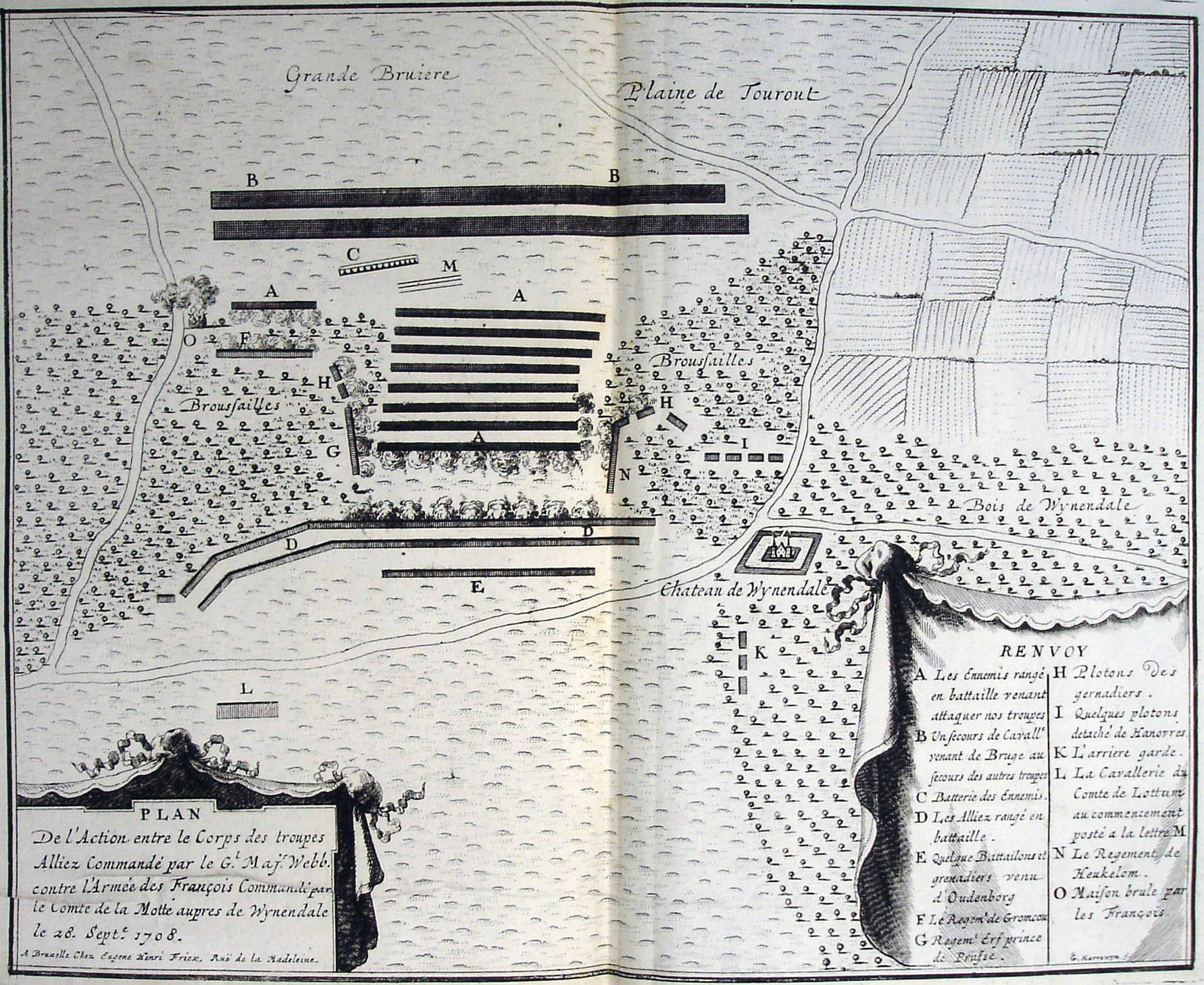 Eigen opname van gedrukt strijdplan, gepubliceerd door Eugène Henri Fricx in Brussel in 1708 Guy de gand 1 nov 2006 22:51 (CET)